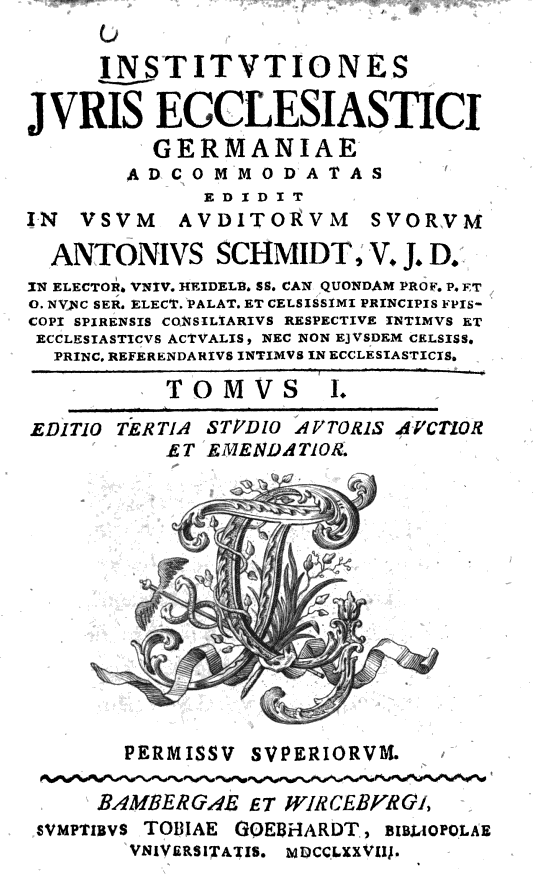 Philipp Anton Schmidt, Weihbischof von Speyer, Titelblatt eines seiner Bücher